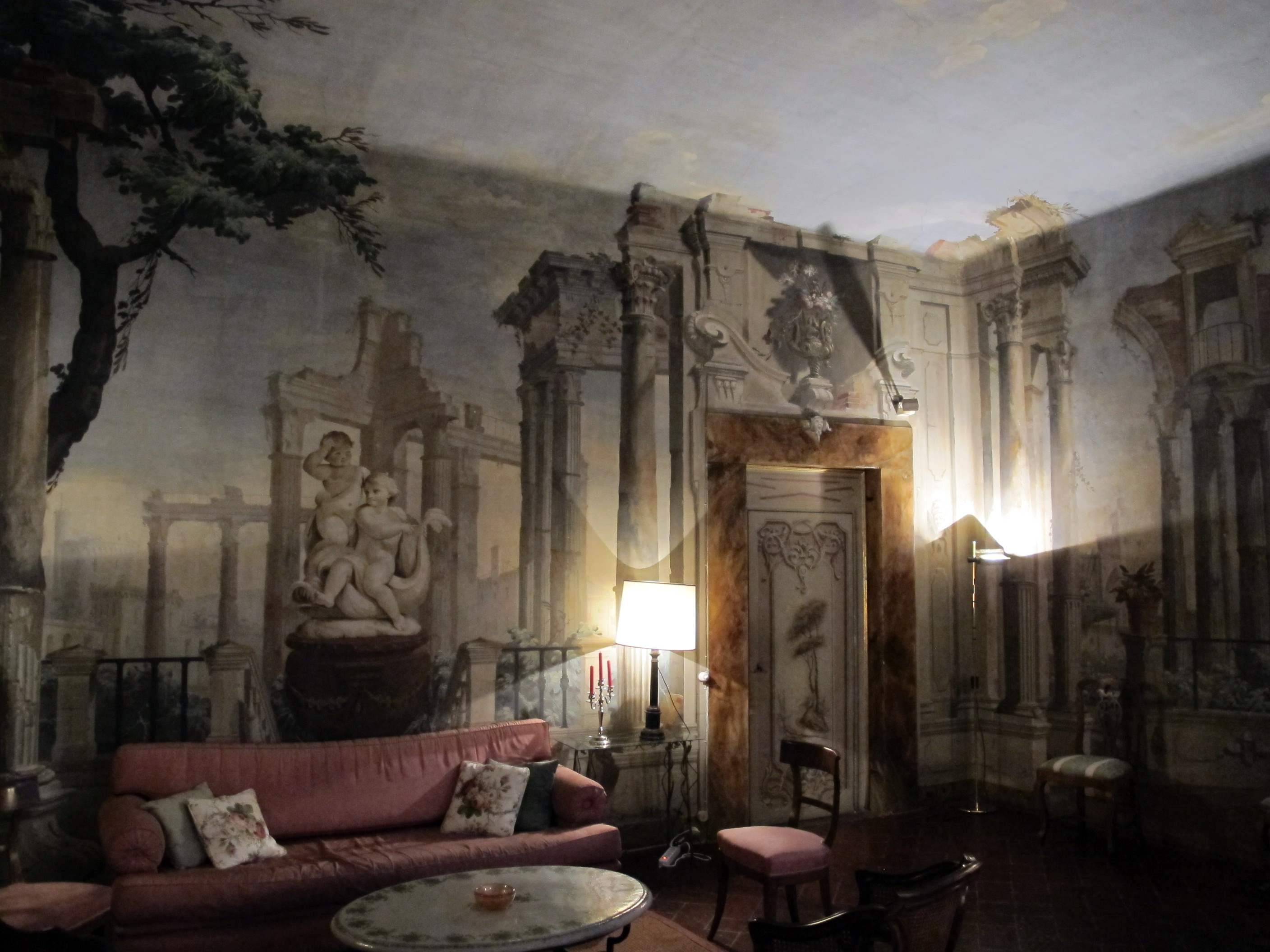 Palazzo niccolini al duomo, sala delle rovine